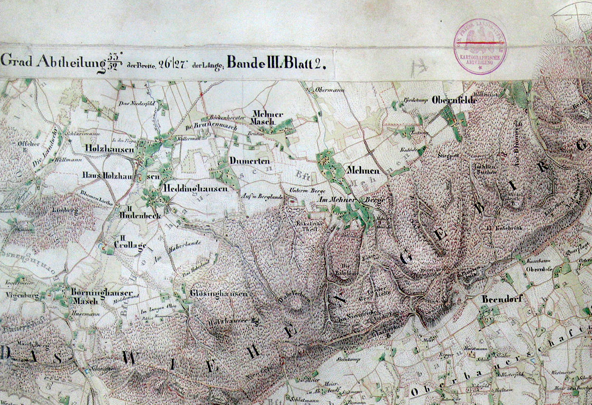 Karte 1:25.000 des Wiehengebirges bei Blasheim